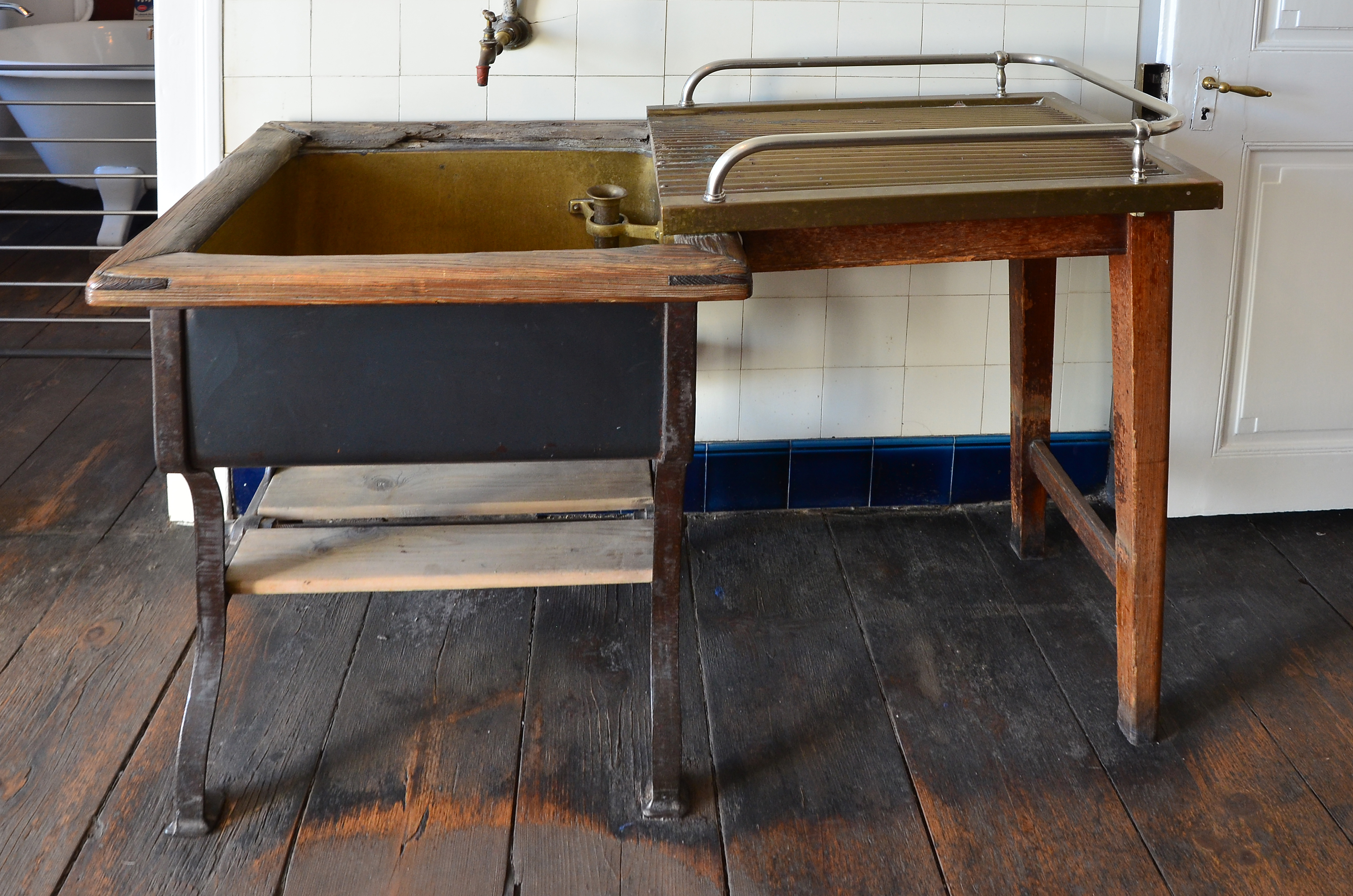 Museum Haus Hövener, historische Spüle